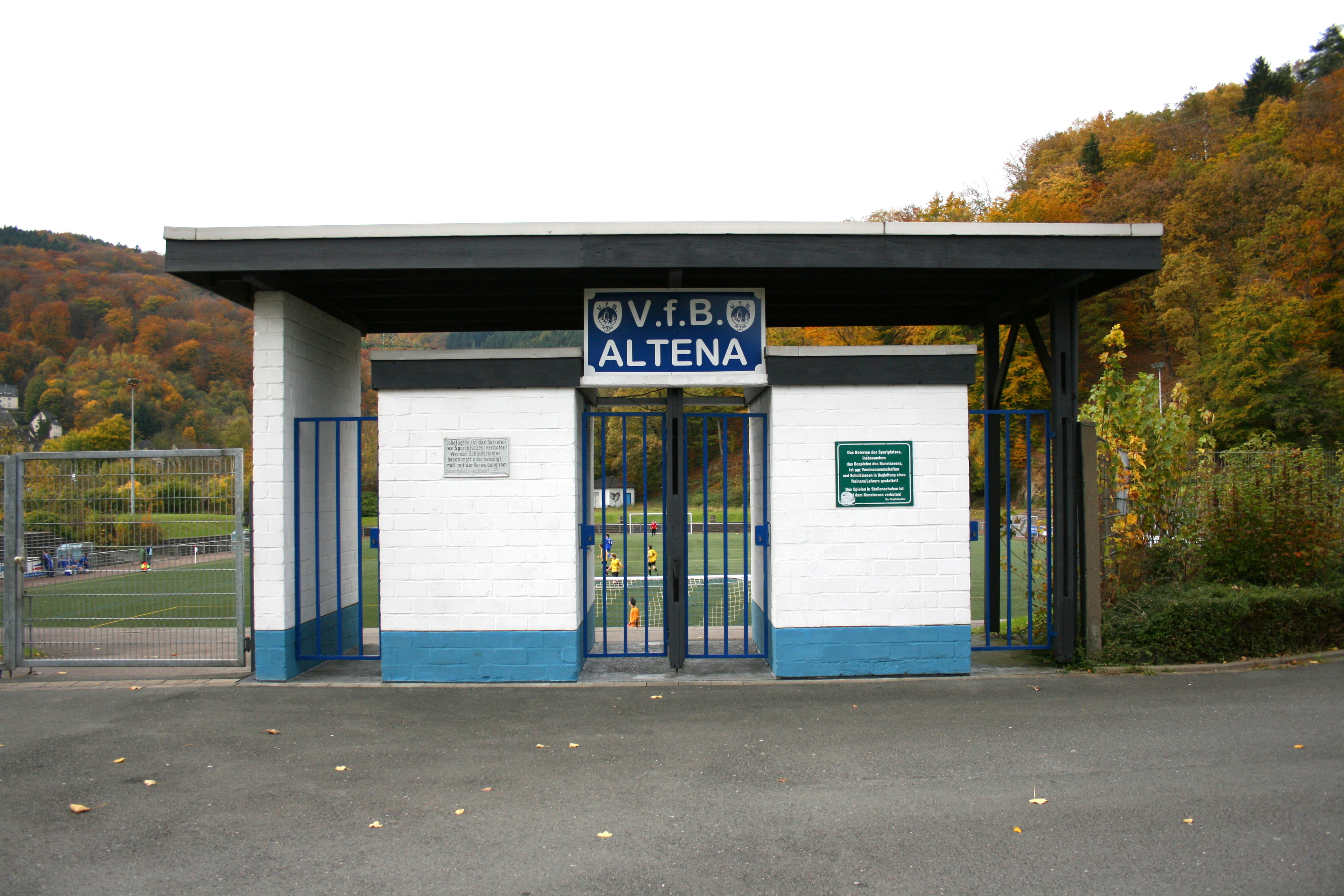 Sportzentrum Pragpaul in Altena